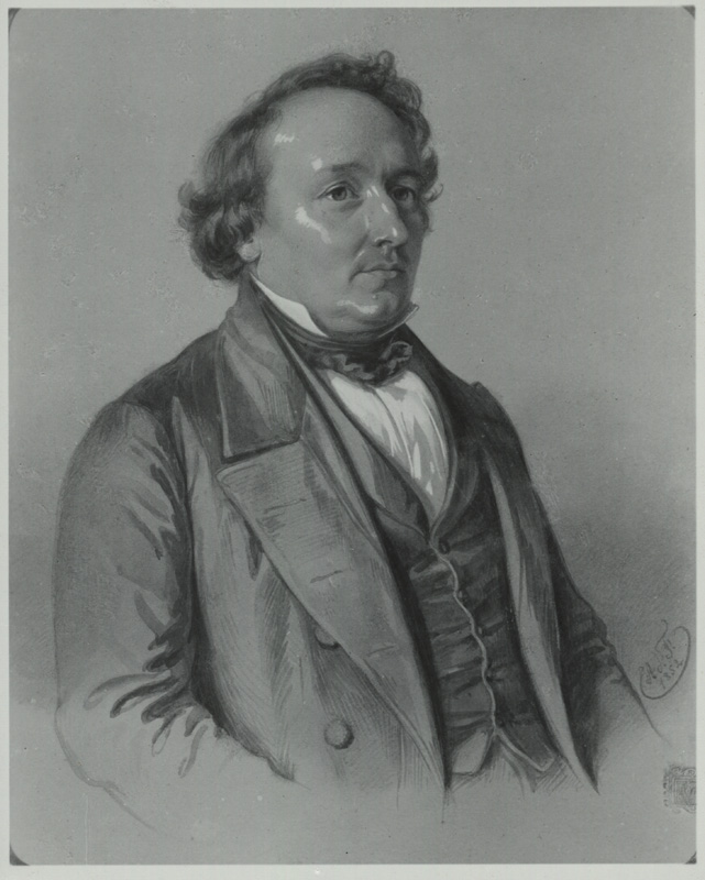 Гагенбах, Карл Рудолф